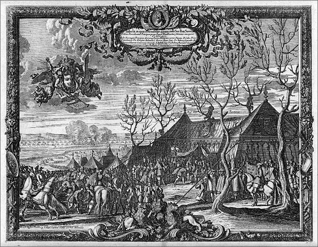 Jerzy Rakoczy u Karola Gustawa pod Modliborzycami, koniec 1657 w.